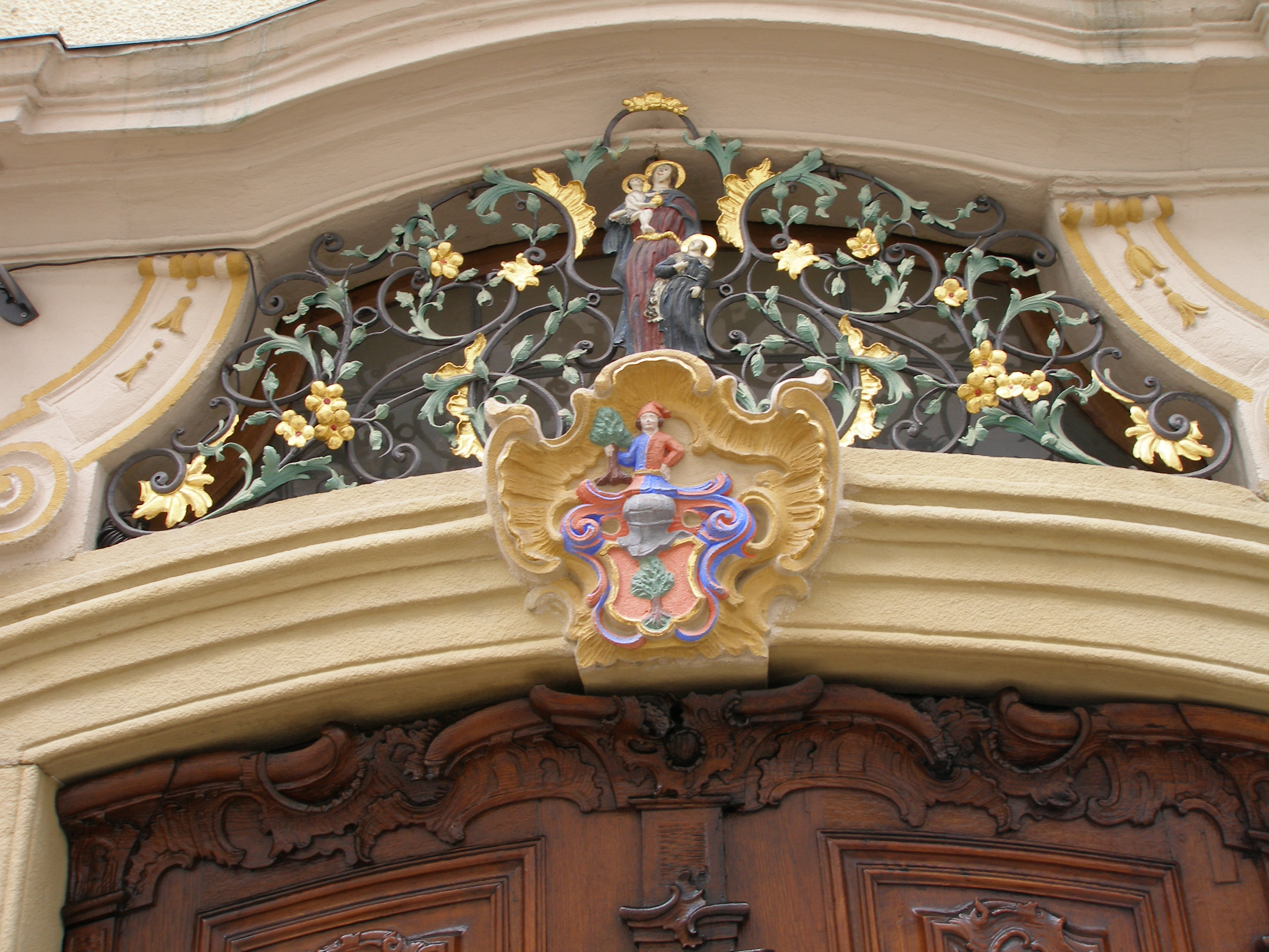 Schwäbisch Gmünd OLYMPUS DIGITAL CAMERA